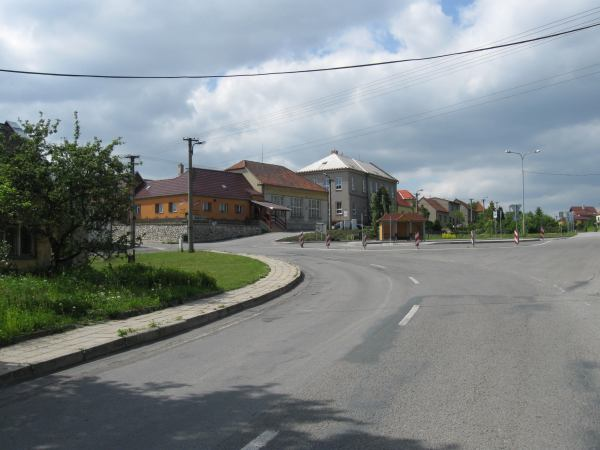 Senetářov - střed obce